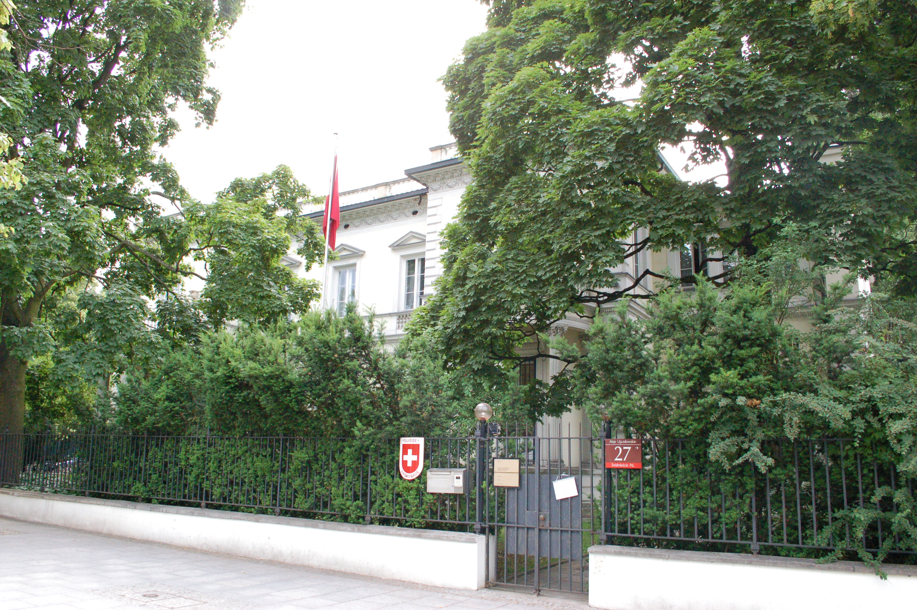 Warschau, Rau-Palast/Schweizer Botschaft